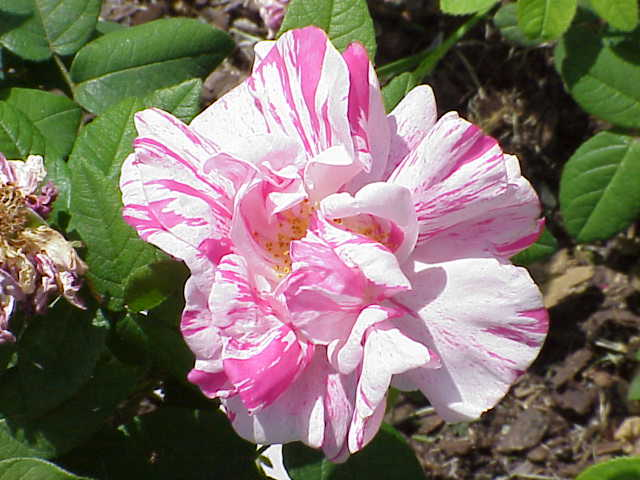 Species: Rosa gallica Family: Rosaceae Cultivar: versicolor Image No. 9